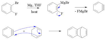 Diels-Alder reakcija